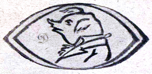 Штепель А.Л. Дурова